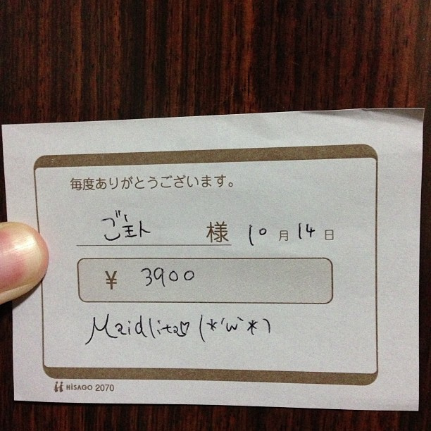 upload